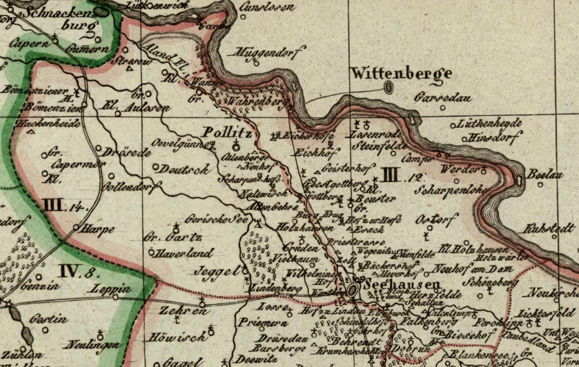 Die Kantone Pollitz und Seehausen im Distrikt Stendal, Departement der Elbe, Königreich Westphalen